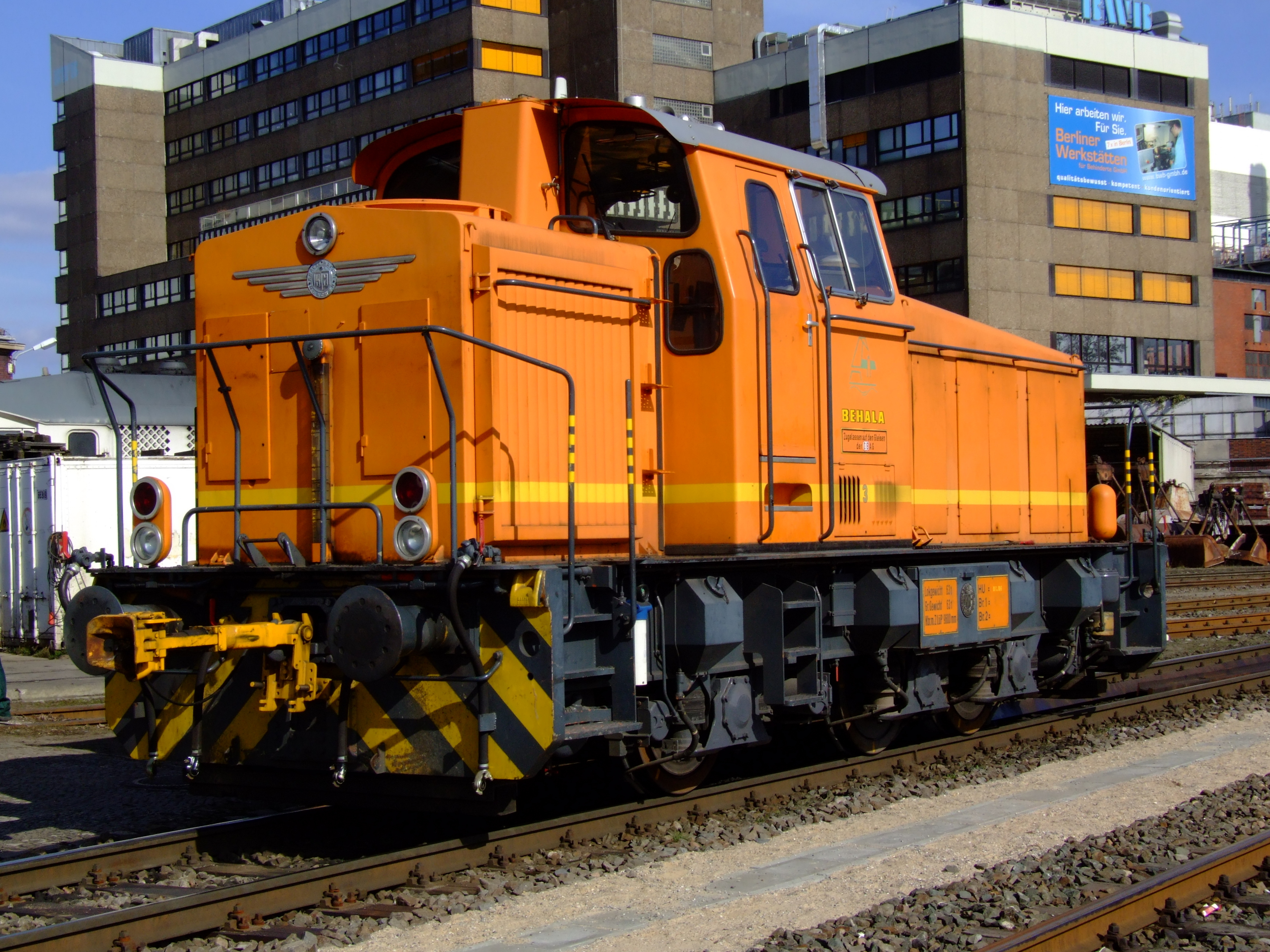 Berliner Hafen- und Lagerhausgesellschaft mbH BEHALA Krauss Maffei diesel lok at BEHALA Hafenbahnhof near Westhafen bahnhof, Berlin.